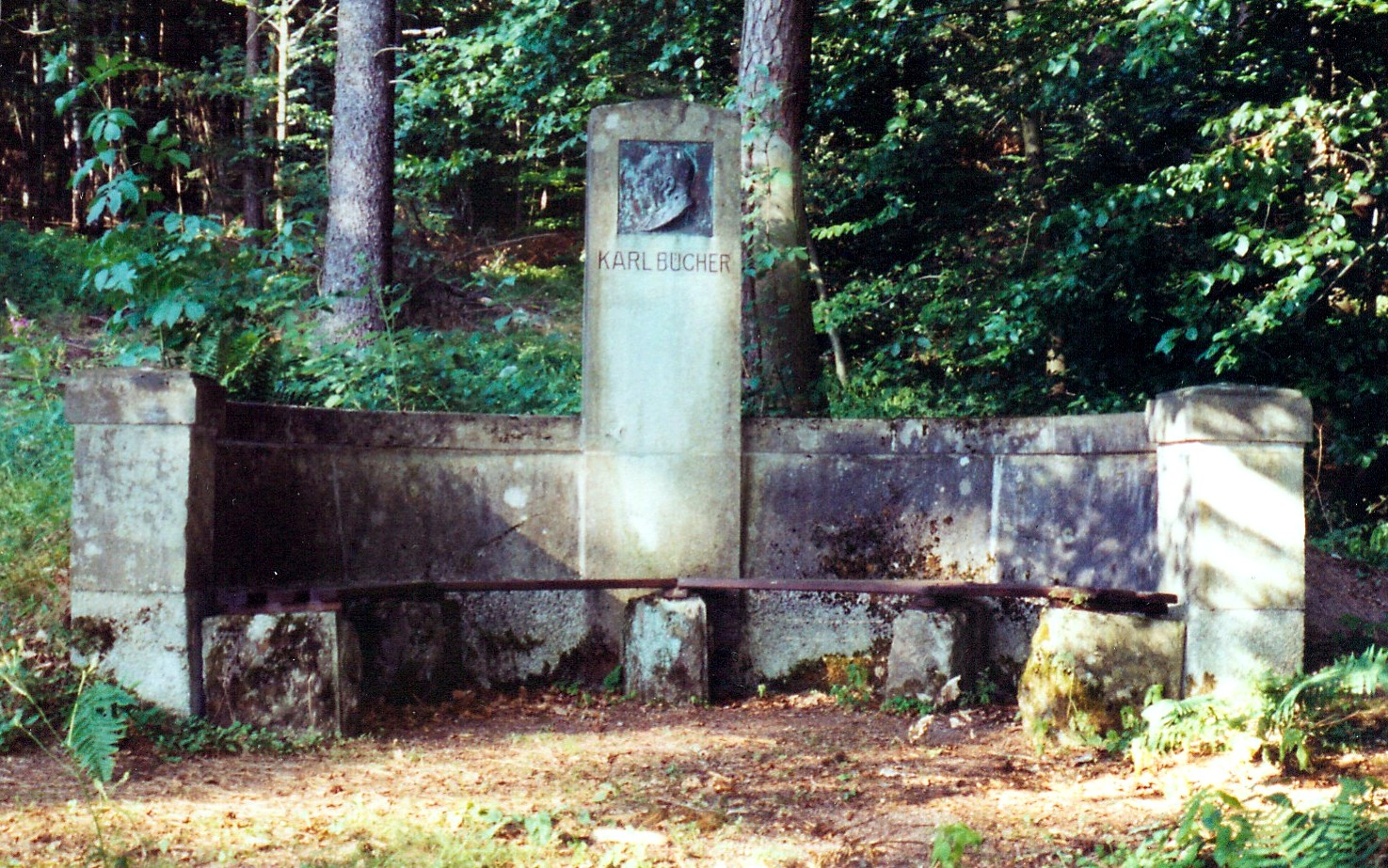 Das Karl-Bücher-Denkmal in Bad Liebenstein im Juli 2006. Auf der Rückseite steht der Text: „Dankbarkeit half diesen Stein zu errichten“.